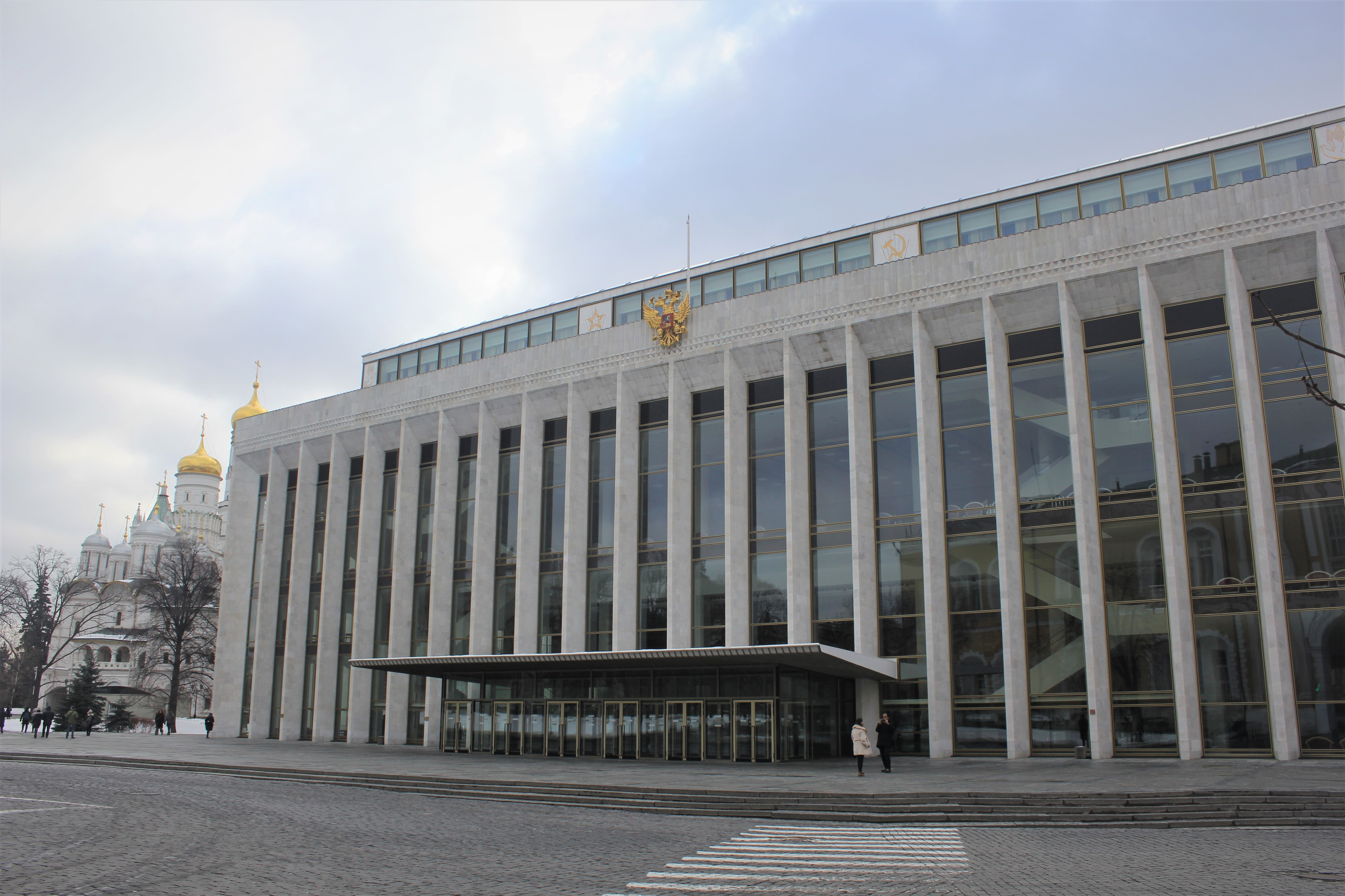 Государственный Кремлёвский дворец: нет адреса БТИ, Тверской, Центральный округ, Москва